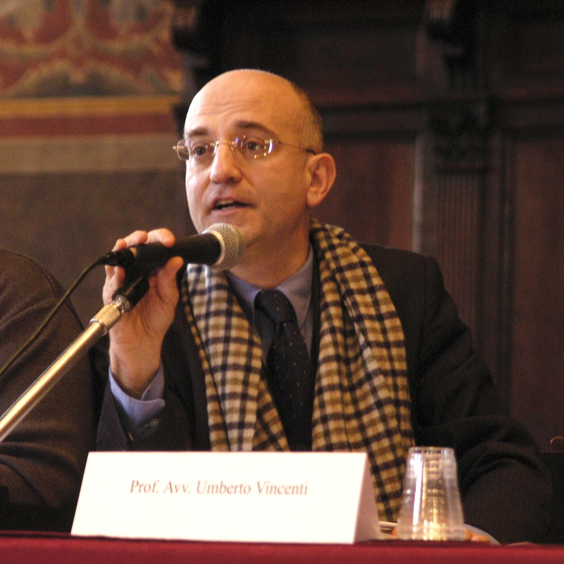 Prof. Vincenti Umberto